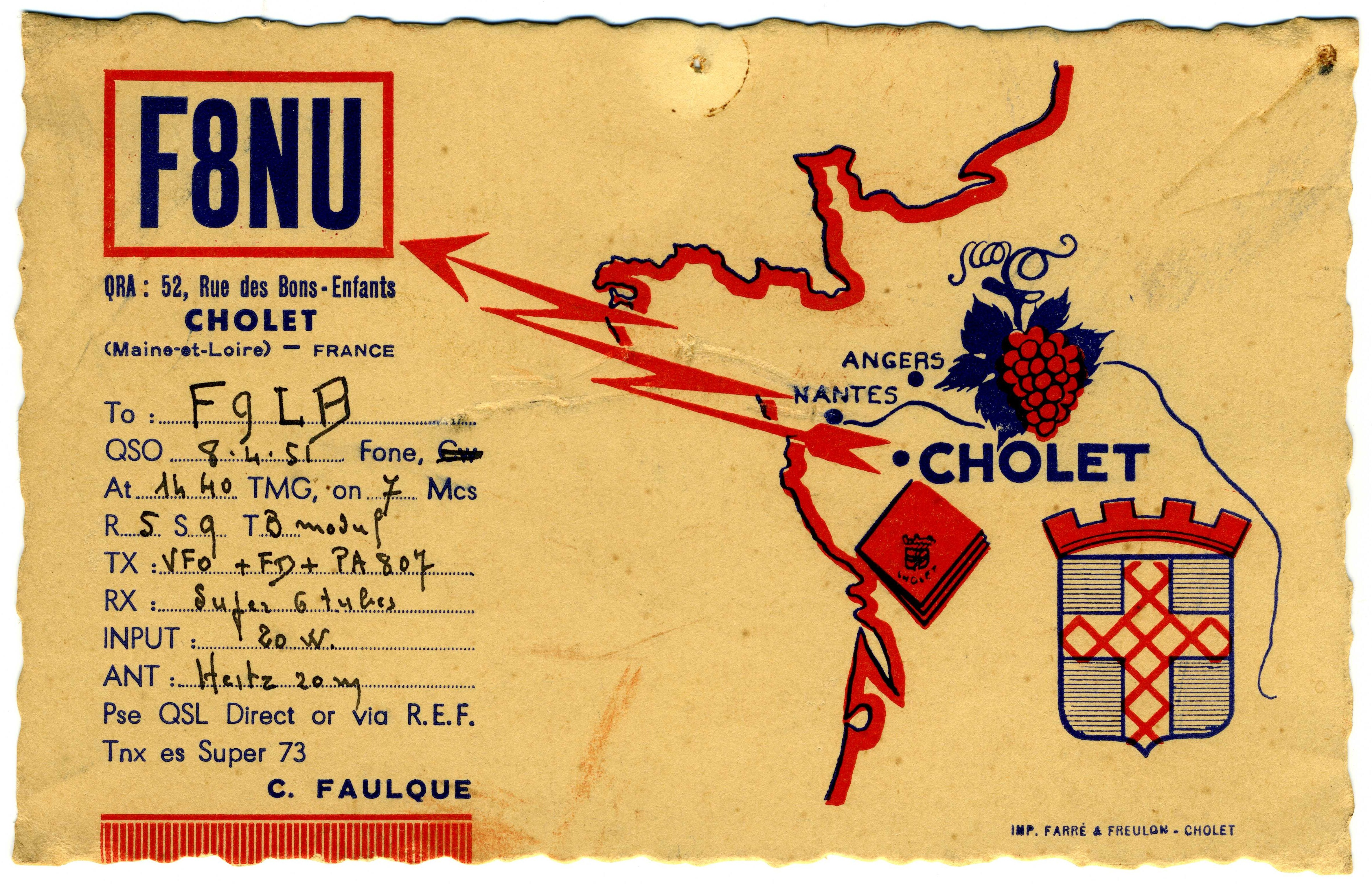 Carte QSL de F8NU (France) envoyée à F9LB (France), avril 1951.